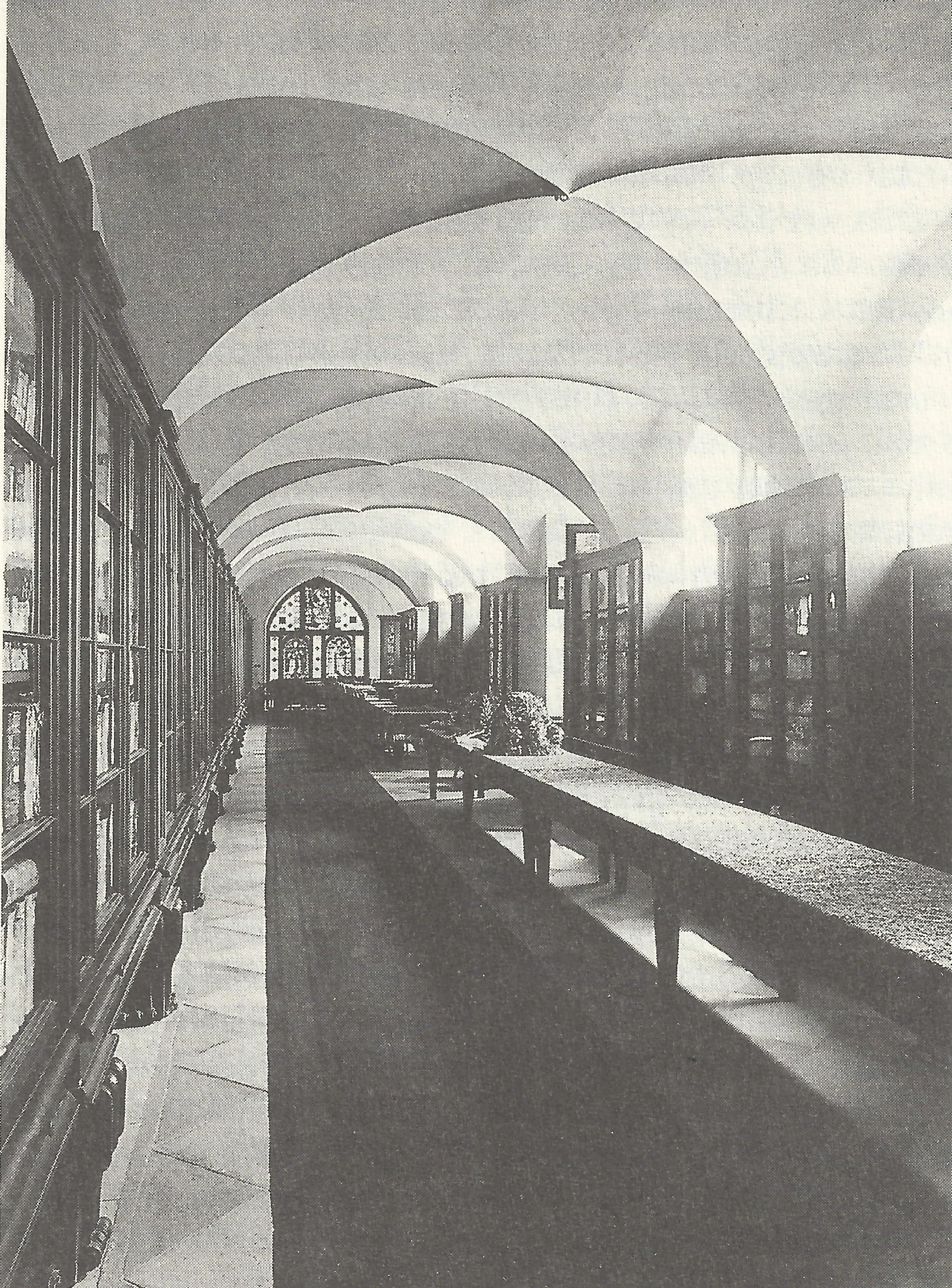 Schloss Schlobitten, Alte Bilbliothek, etwa 1915; einziger Raum, der beim Umbau (1713) des einstigen Renaissanceschlosses bis zum Brand 1945 nicht verändert wurde. Enthielt zuletzt insgesamt 55.000 Bände.